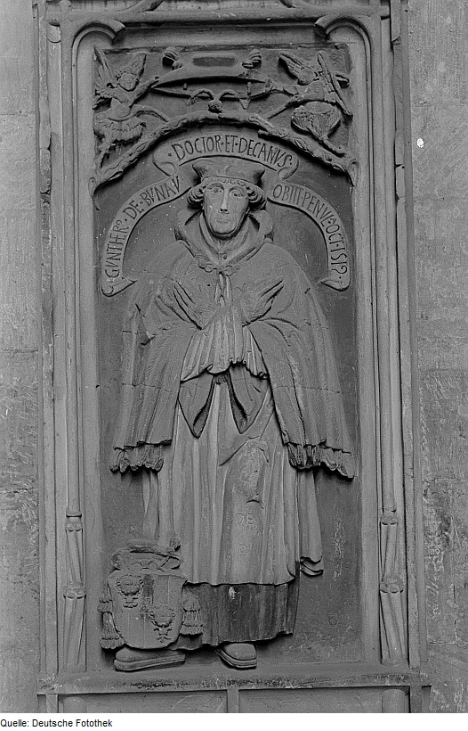 Original image description from the Deutsche FotothekReliefdarstellung Günter von Bünaus